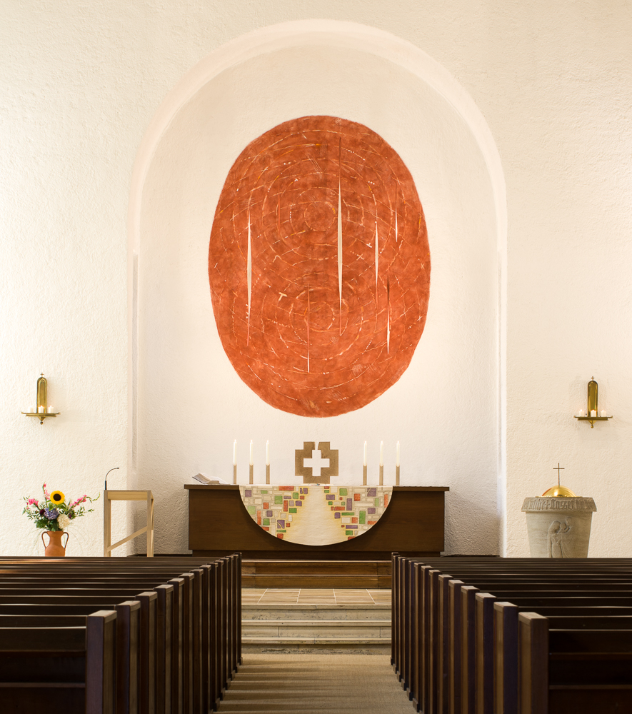 Altarraum der Lutherkirche in Lübeck nach der Umgestaltung durch Künstler Werner Mally